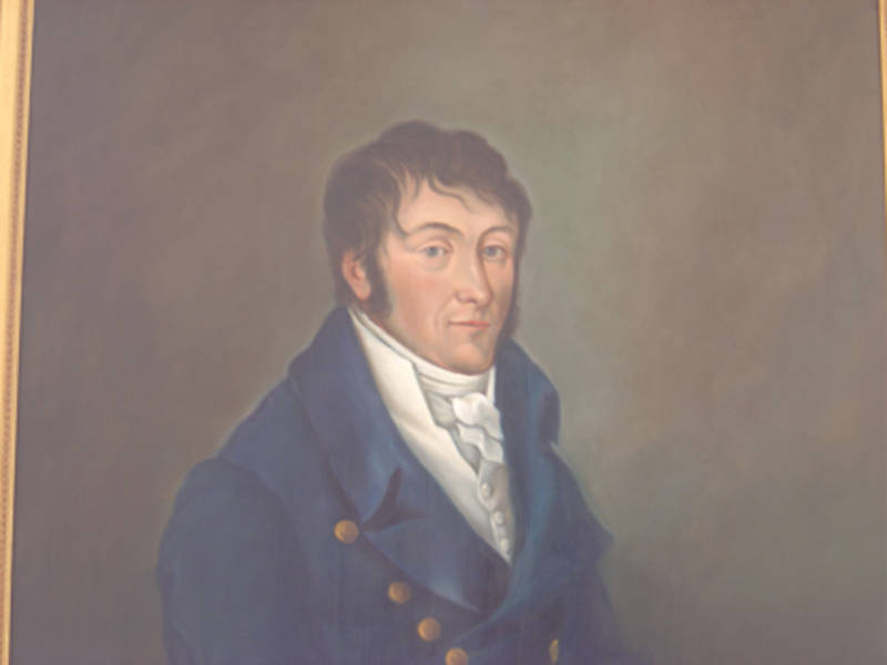 Anton Thomas (1778-1837), 1806-1821 Bürgermeister von Fulda